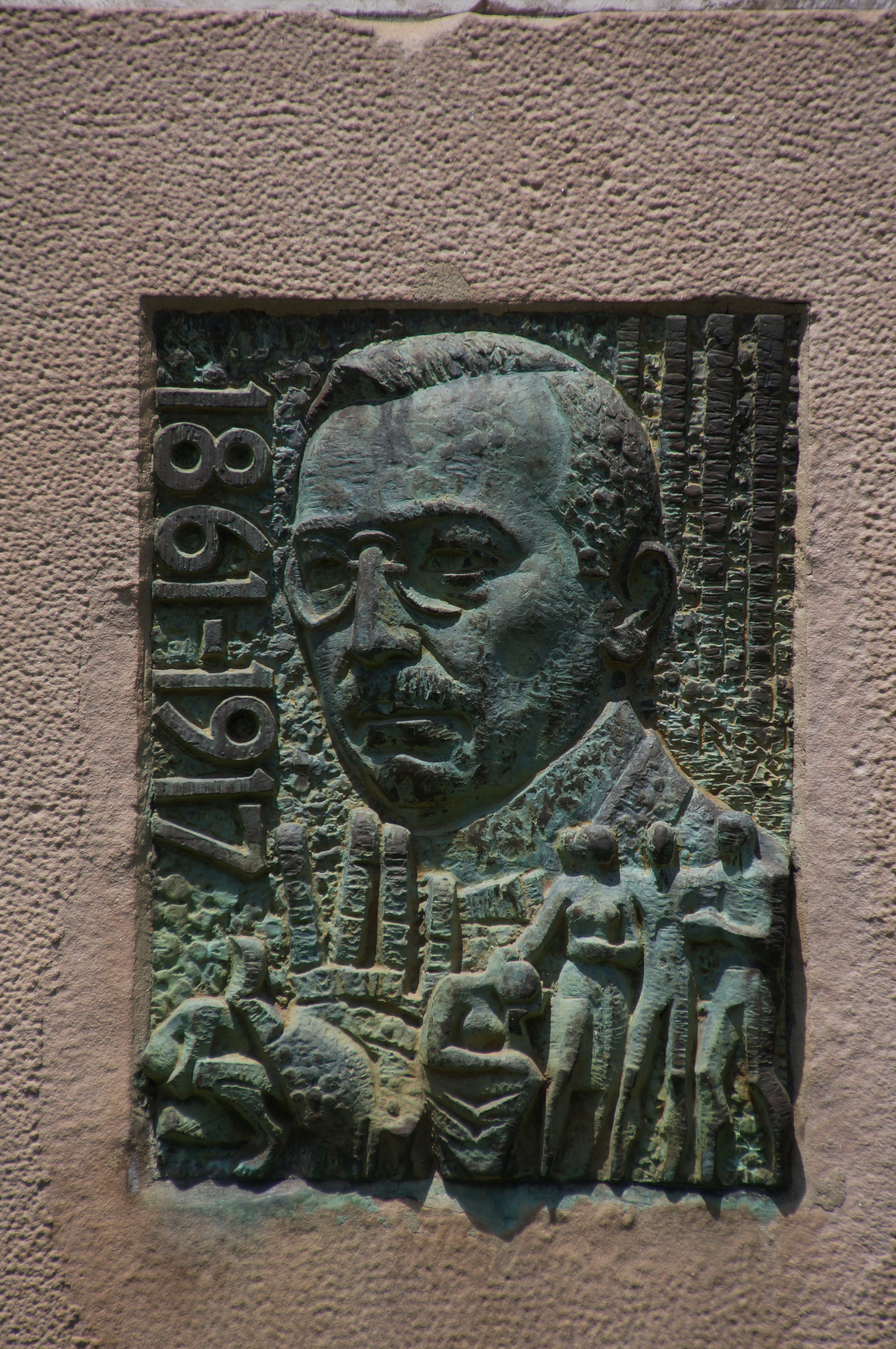 Al doctor Martí i Julià (Josep Dunyach). Pl. Reina Maria Cristina (Barcelona)